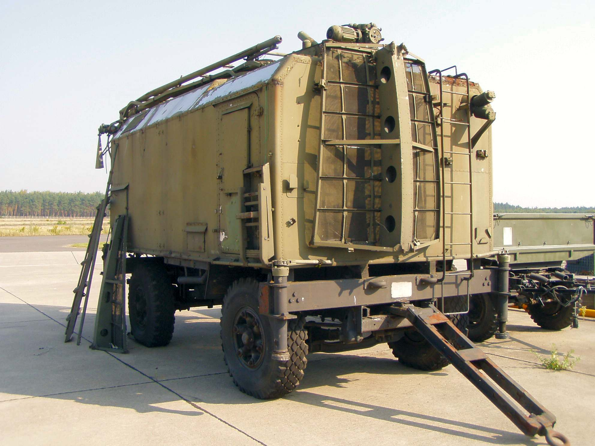 Sende- Empfangskabine des Höhensuchradars PRW-9 in Marschlage auf dem Vorfeld des Luftwaffenmuseums in Berlin-Gatow. Die hier abgebildete Station ist ein PRW-16 mit der taktischen Nummer 6216. Ich kann dies bezeugen, da ich die Station selbst besichtigt habe. Ich war Stationsleiter einer solchen Funkmessstation in Putgarten. Die links oben sichtbare "Peilantenne" ist der außen sichtbare Beweis für einen PRW-16. Der PRW-9 hatte kein solches Peilsystem